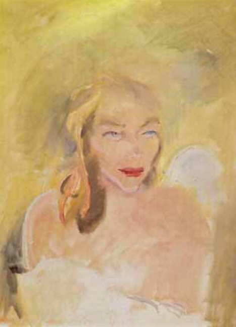 Bildnis Gertrud Eysoldt, um 1910, Öl auf Leinwand, 62 x 46,5 cm Theaterwissenschaftliche Sammlung der Universität zu Köln, Schloss Wahn, Inv.Nr. 41165 (Sammlung Niessen)